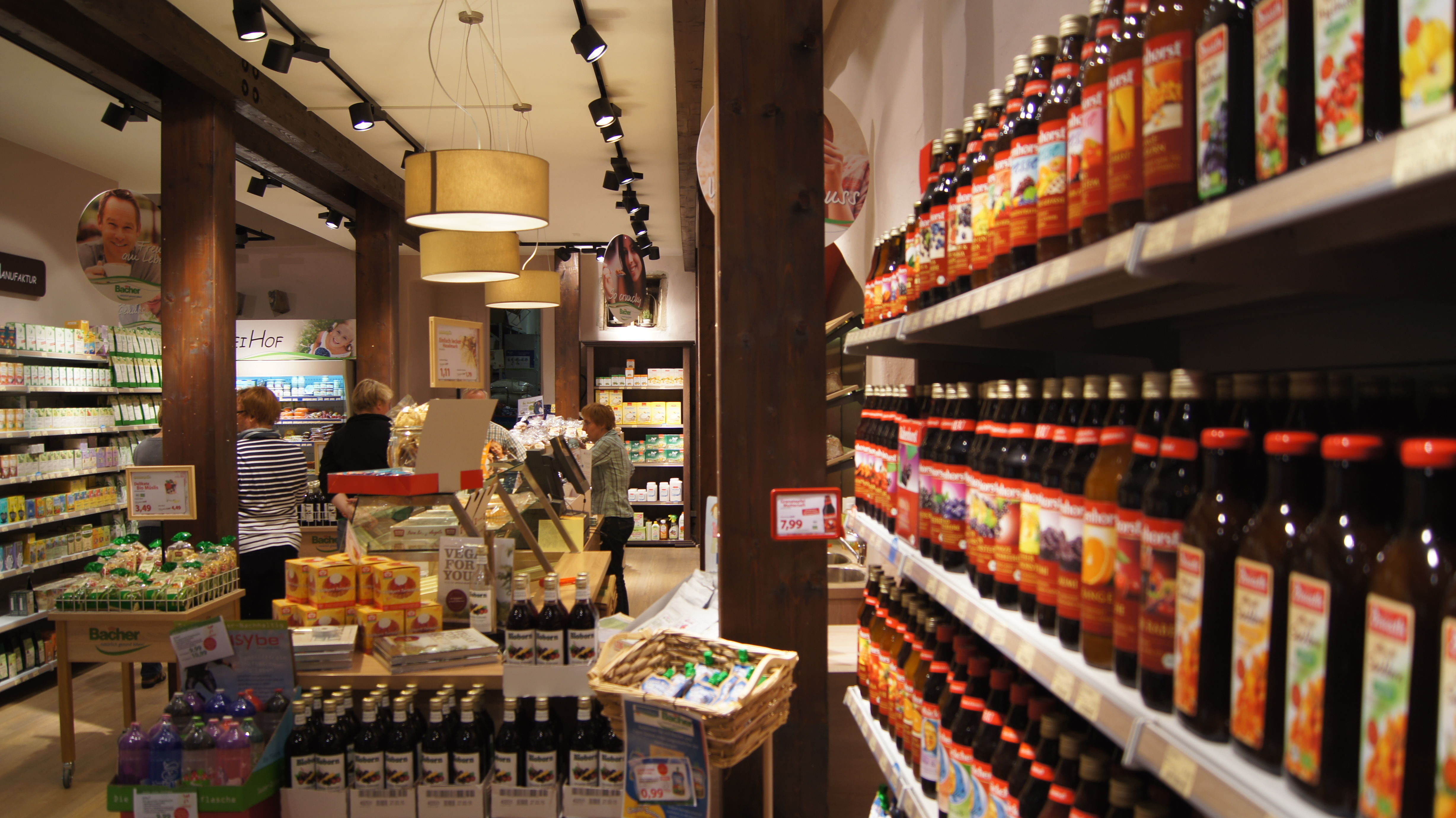 Filiale in der Fussgängerzone in denkmalgeschütztem Gebäude